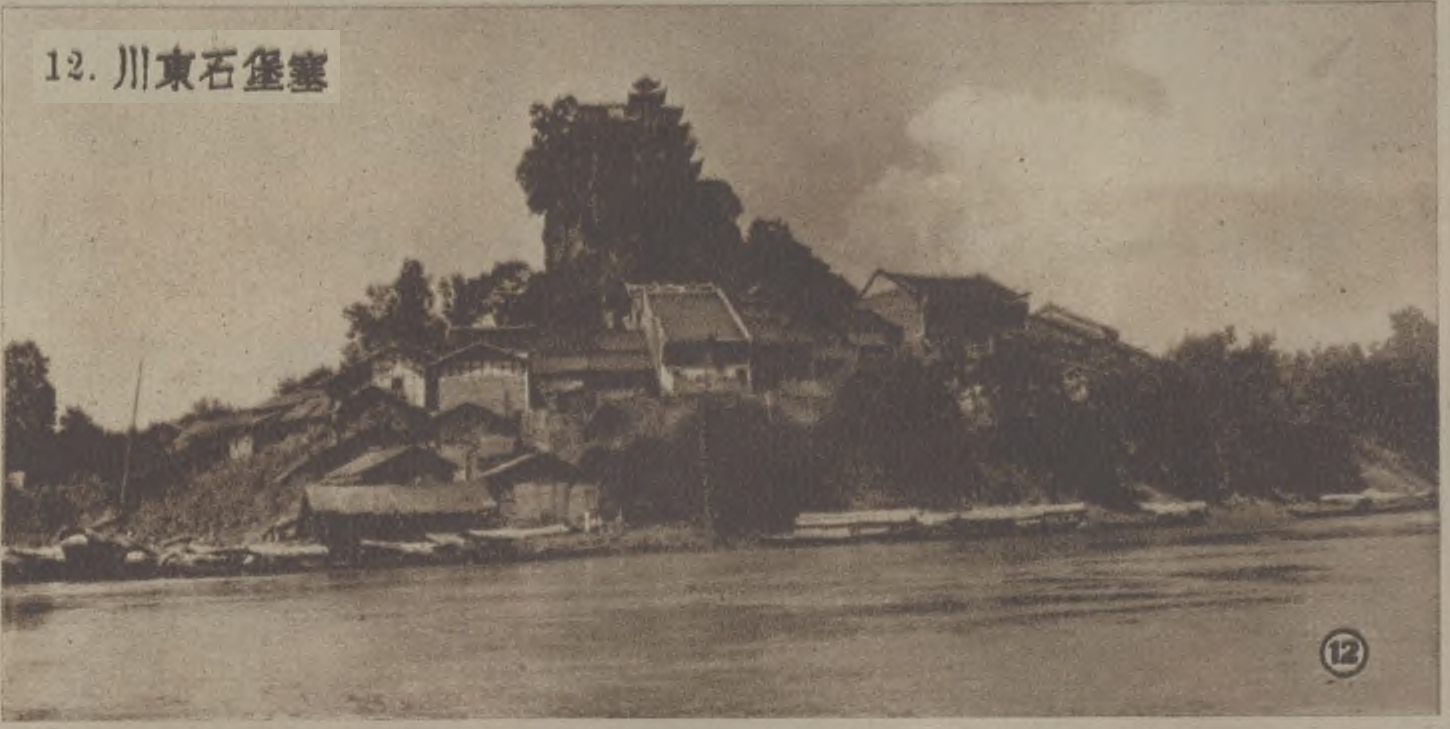 中文（台灣）: 美麗的四川 戴克明 《美術生活》 1935年[ 第11期 ，29-30頁]